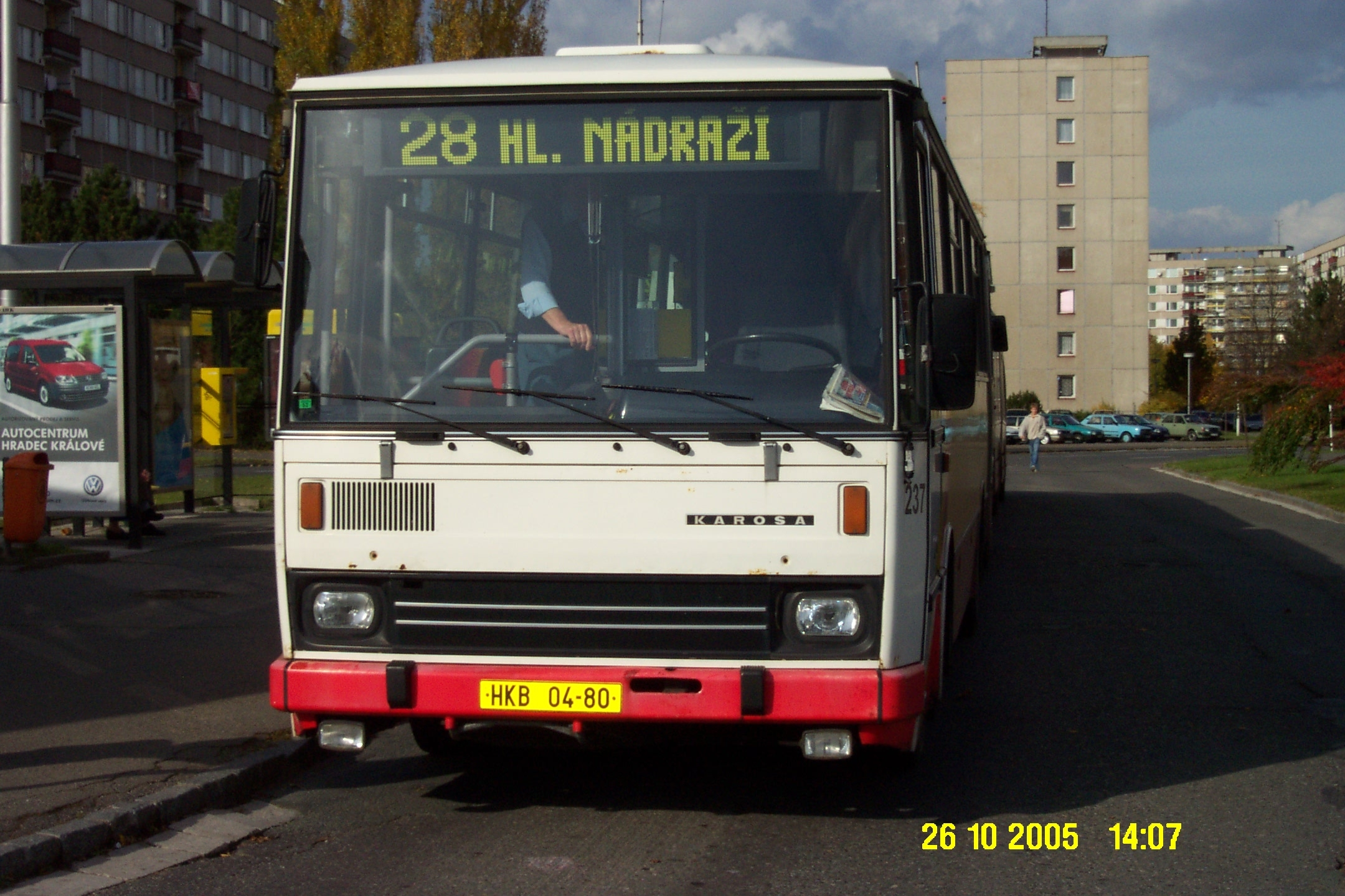 Městský autobus typu Karosa v Hradci Králové